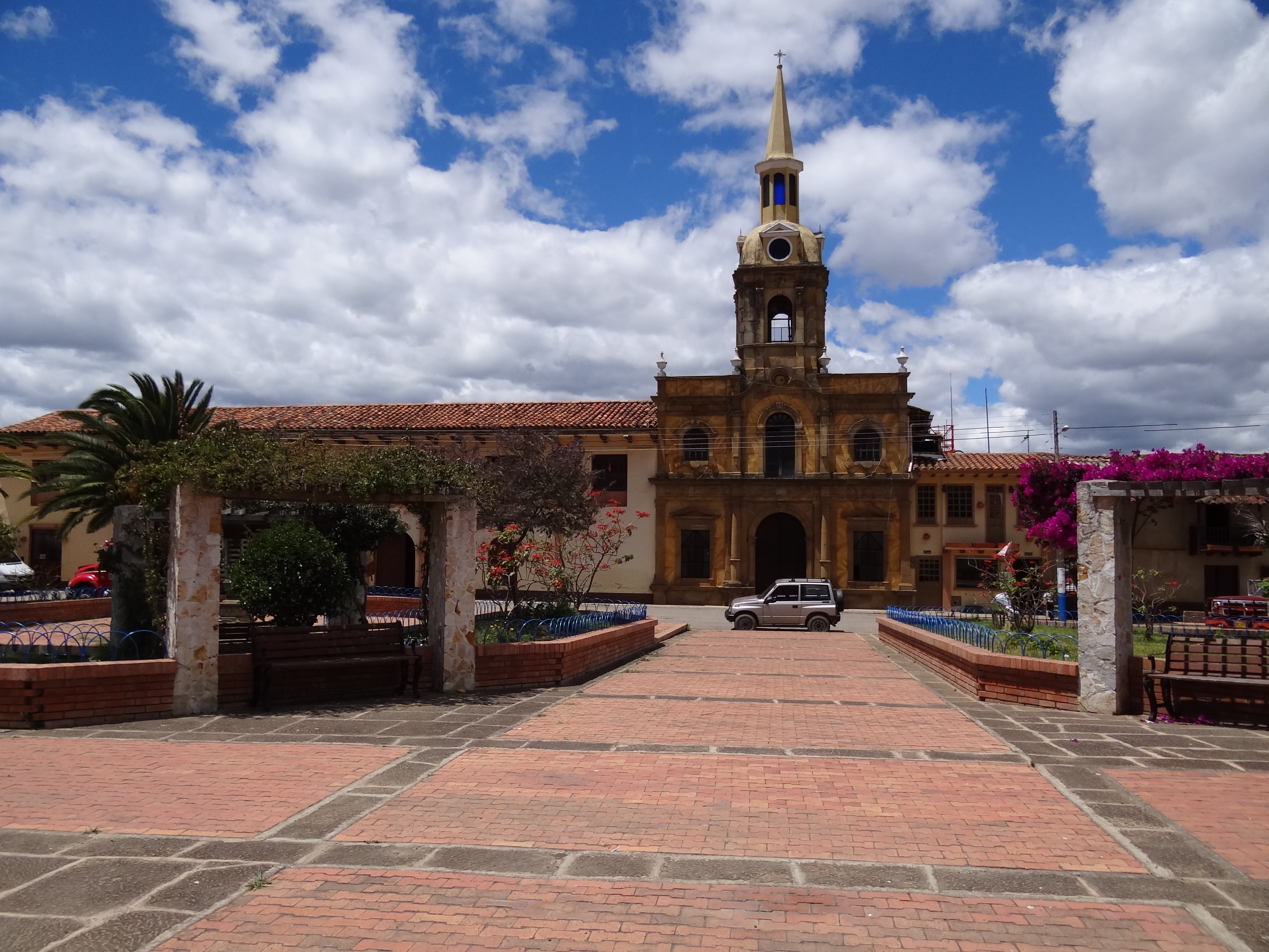 Parque del municipio de Santa Sofía, departamento de Boyacá, Colombia.